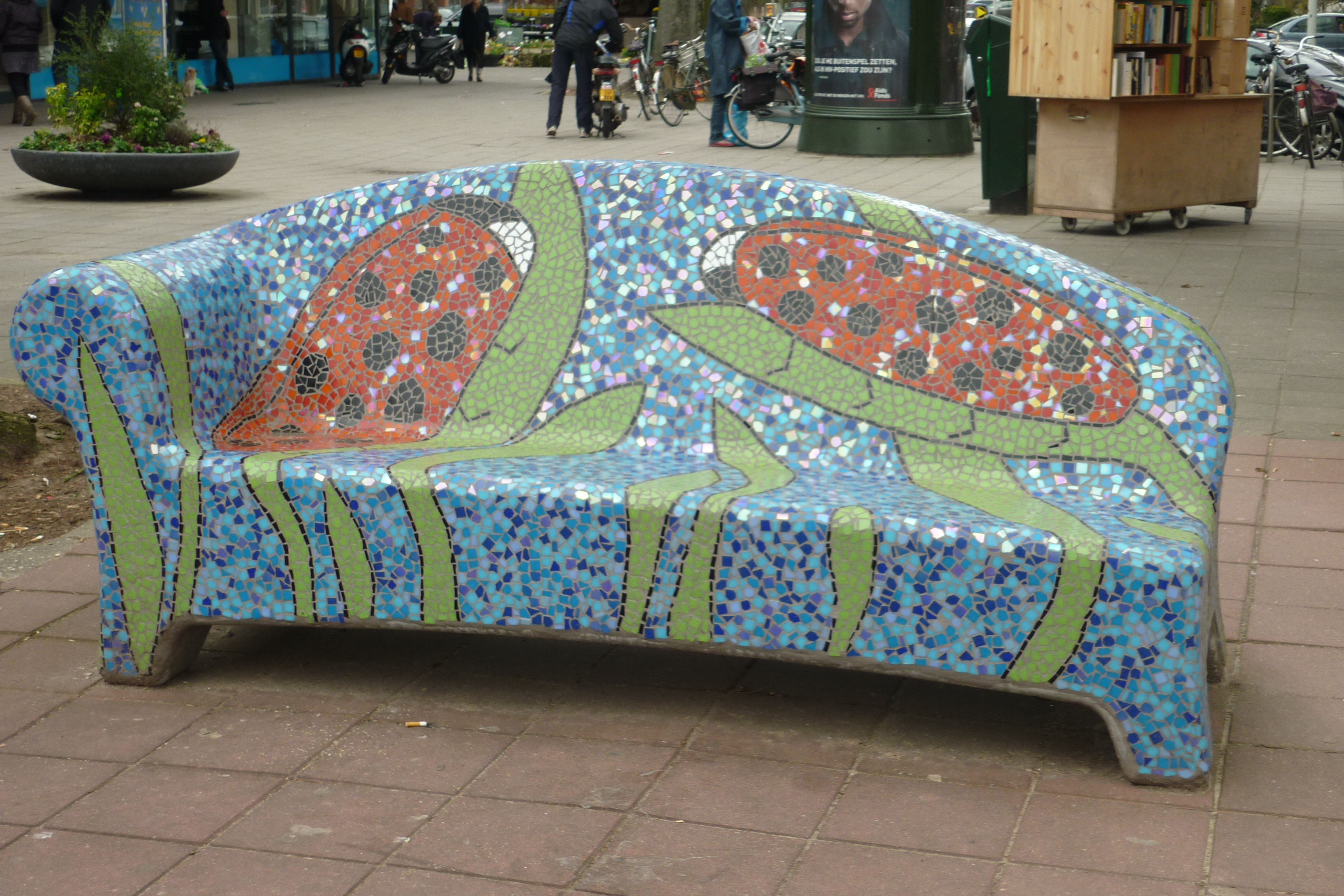 Social SOfa op het WIllem Royaardsplein in Den Haag